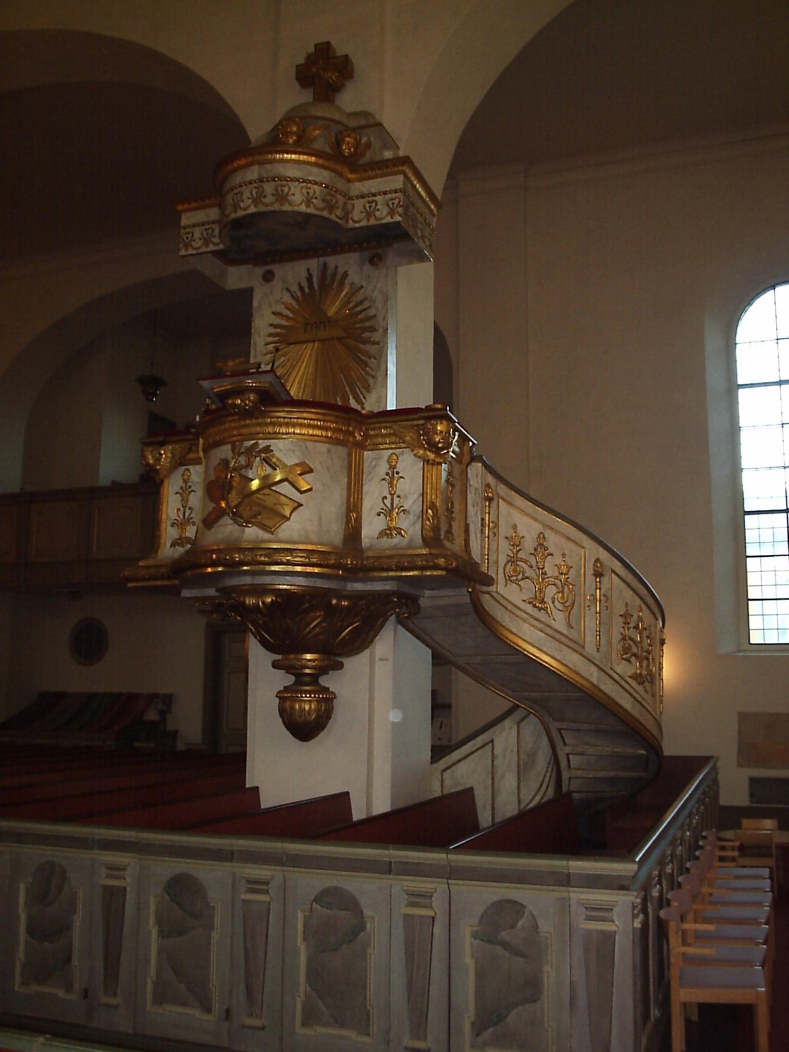 Predikstolen i Sankt Olai kyrka i Norrköping är från 1798 och skapad av bildhuggaren Carl Fredrik Beurling, fotograferad den 21 november 2005 av Harri Blomberg.